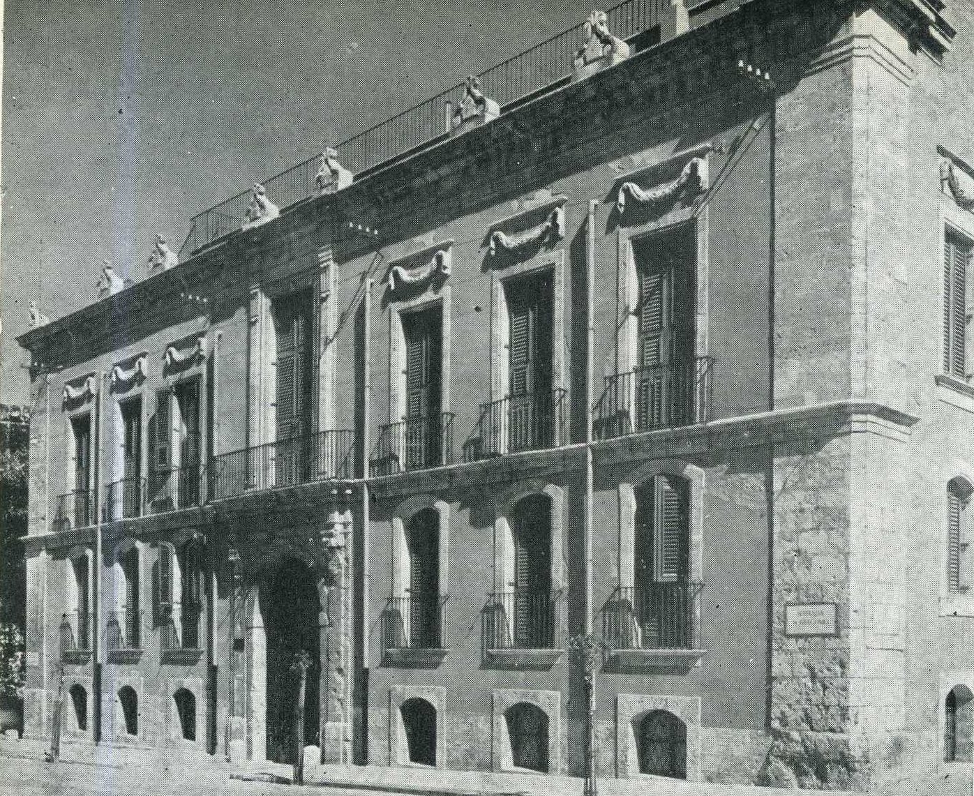 palace